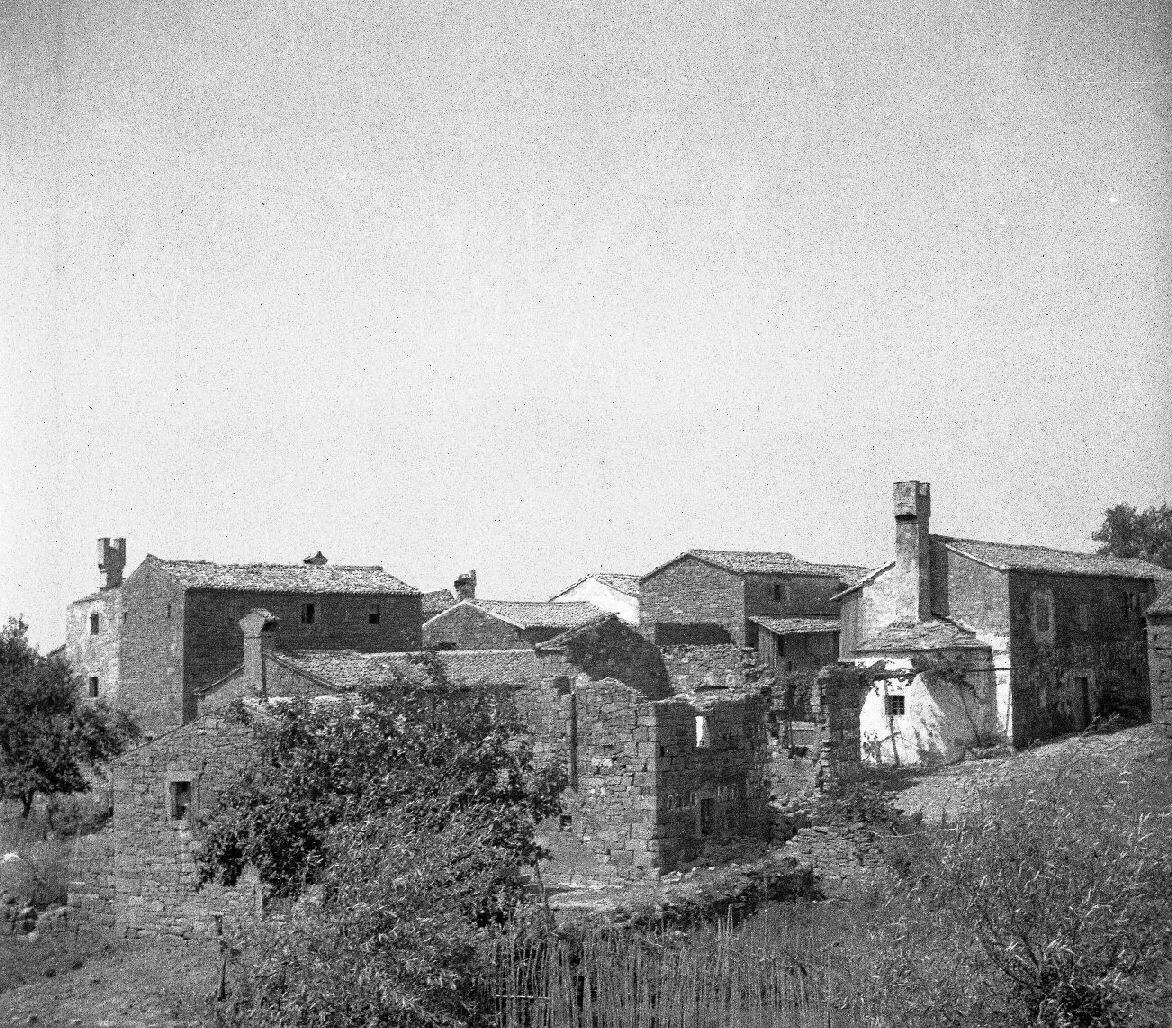 Del Labora, fotografirano z griča kjer stoji cerkev.